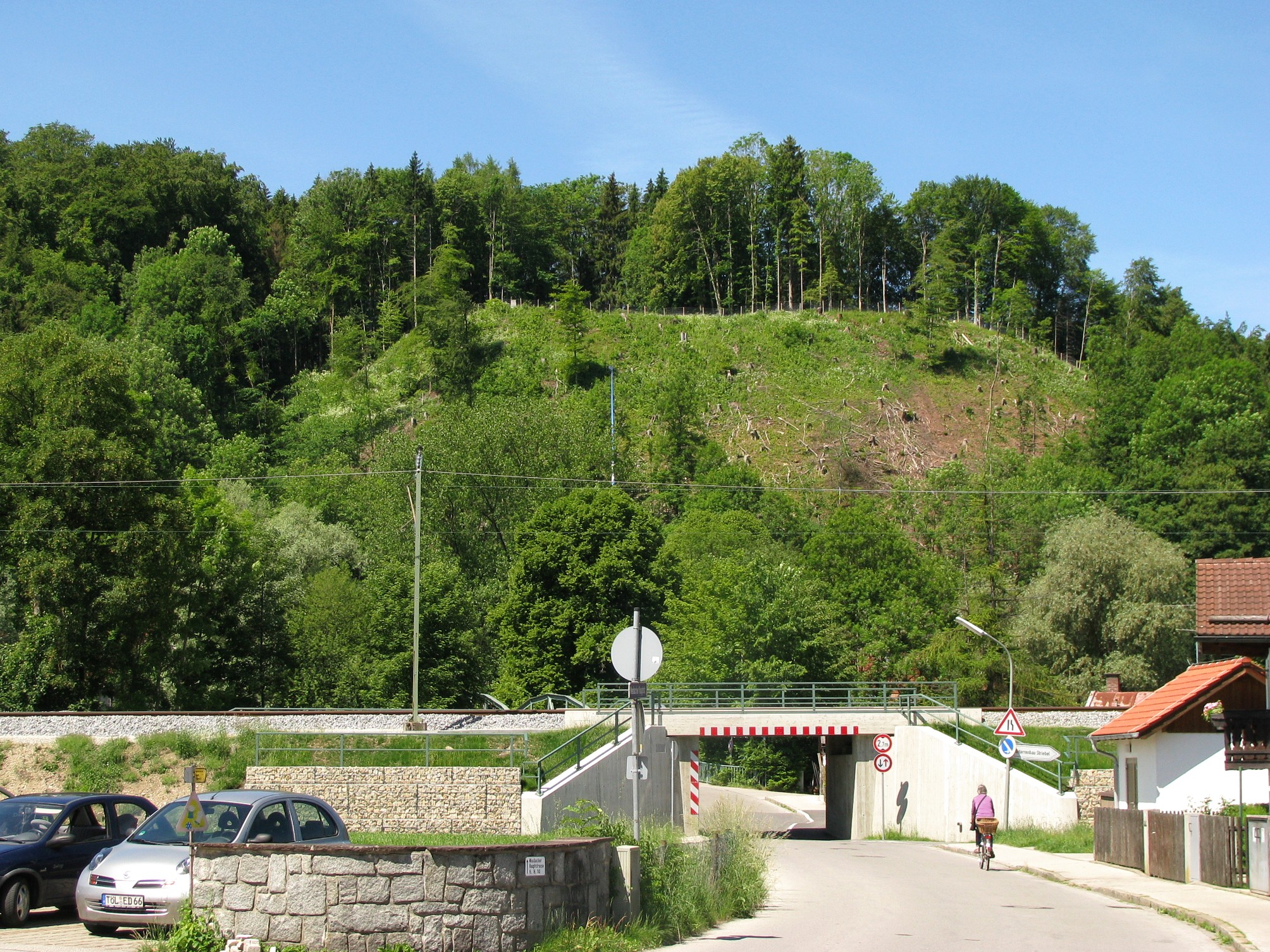 Stelle der ehemaligen Burg Wolfratshausen, von der Weidacher Hauptstraße aus gesehen This is a photograph of an archaeological site.